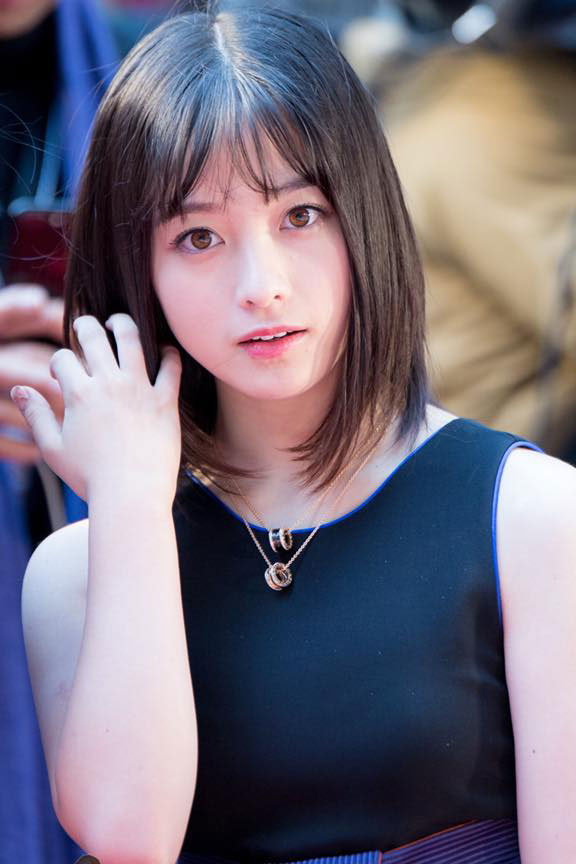 2017年10月25日 東京都港区・六本木ヒルズアリーナで開催された『第30回東京国際映画祭』オープニングセレモニー。被写体：橋本環奈 ／ 撮影者：宗田 英治